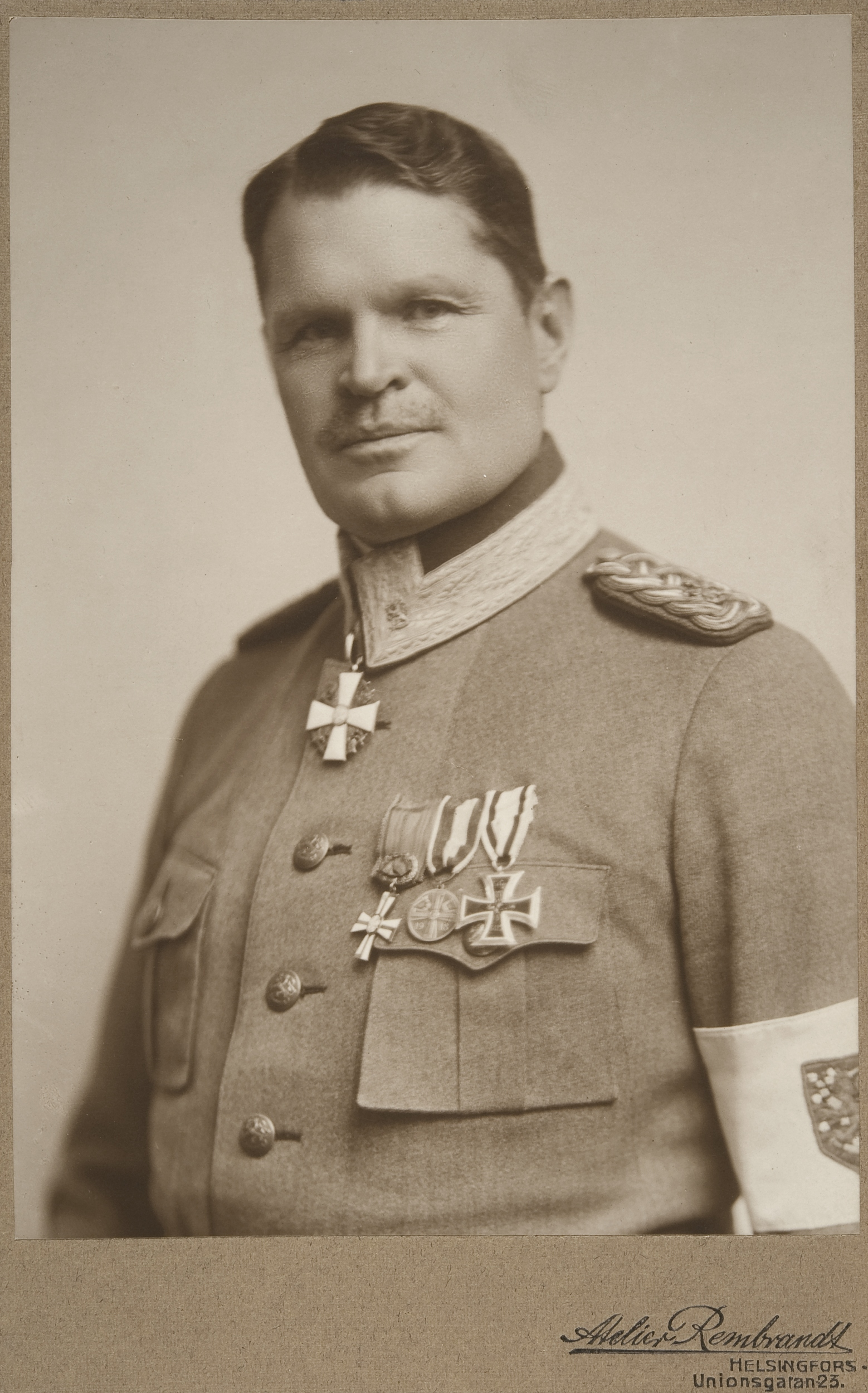 Министр обороны Финляндии Бруно Яаландер